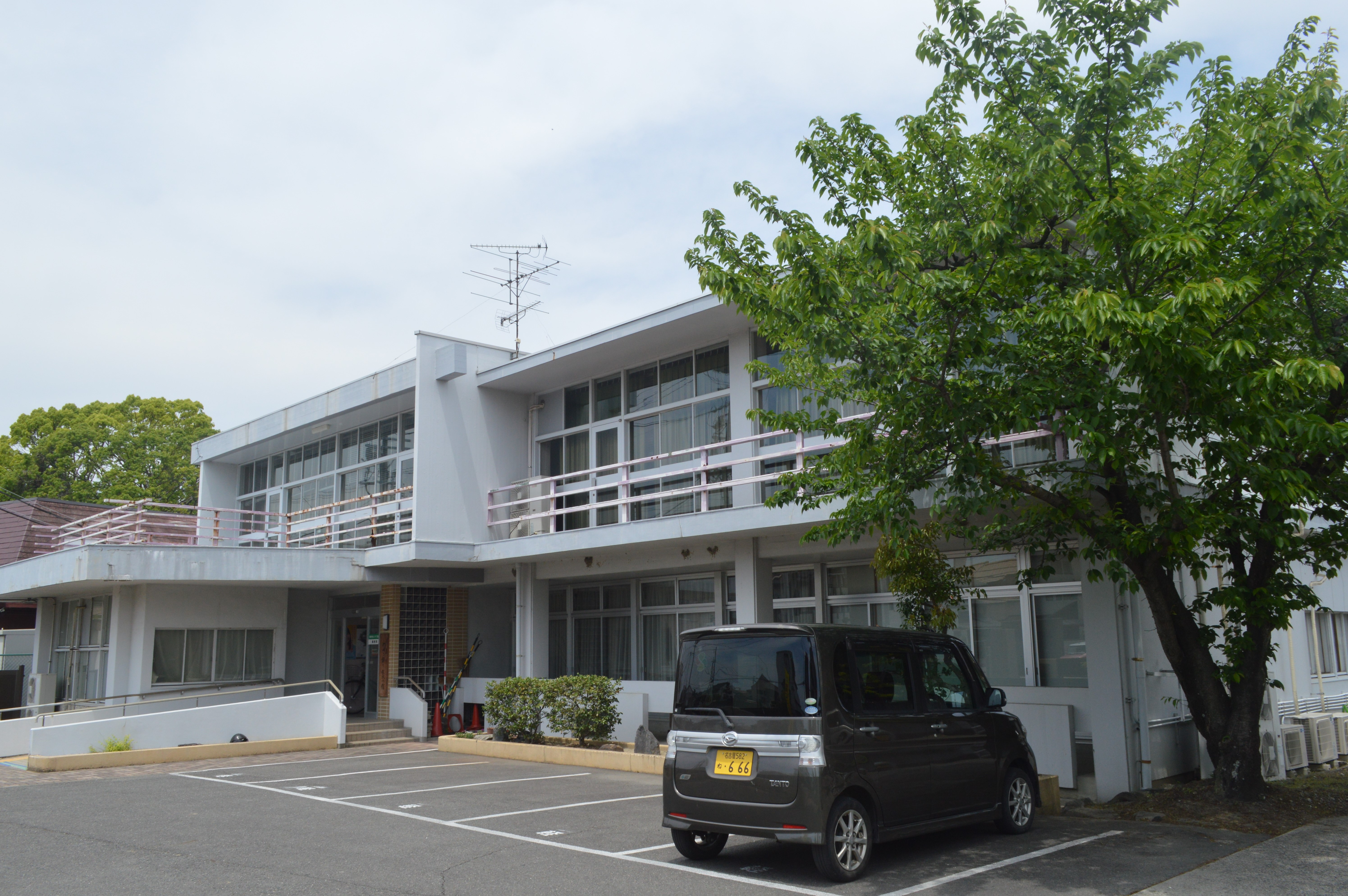 愛知県津島市南門前町にある「わざ・語り・伝承の館」。旧・津島市市立図書館（現在の津島市立図書館）。